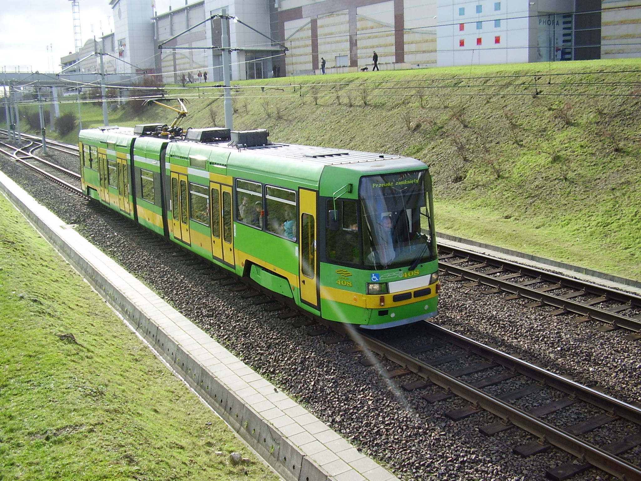 Parada tramwajów na 10-lecie trasy PST